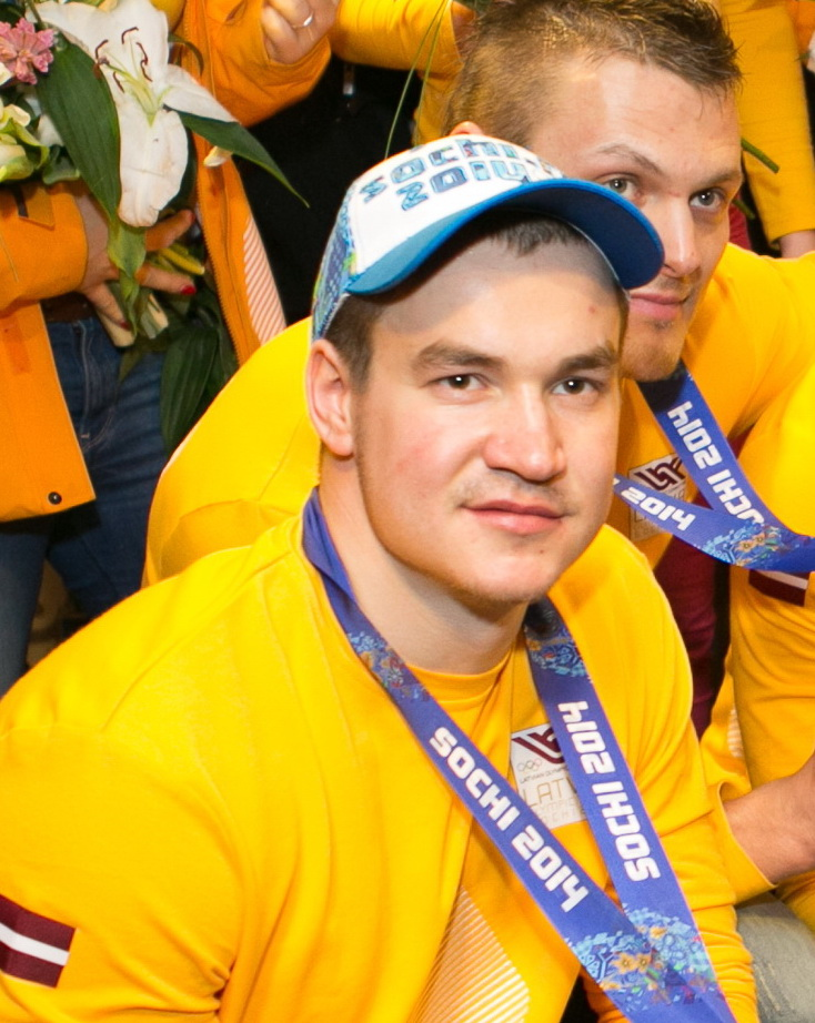 Latvijas Olimpiskās komandas sagaidīšana lidostā "Rīga"